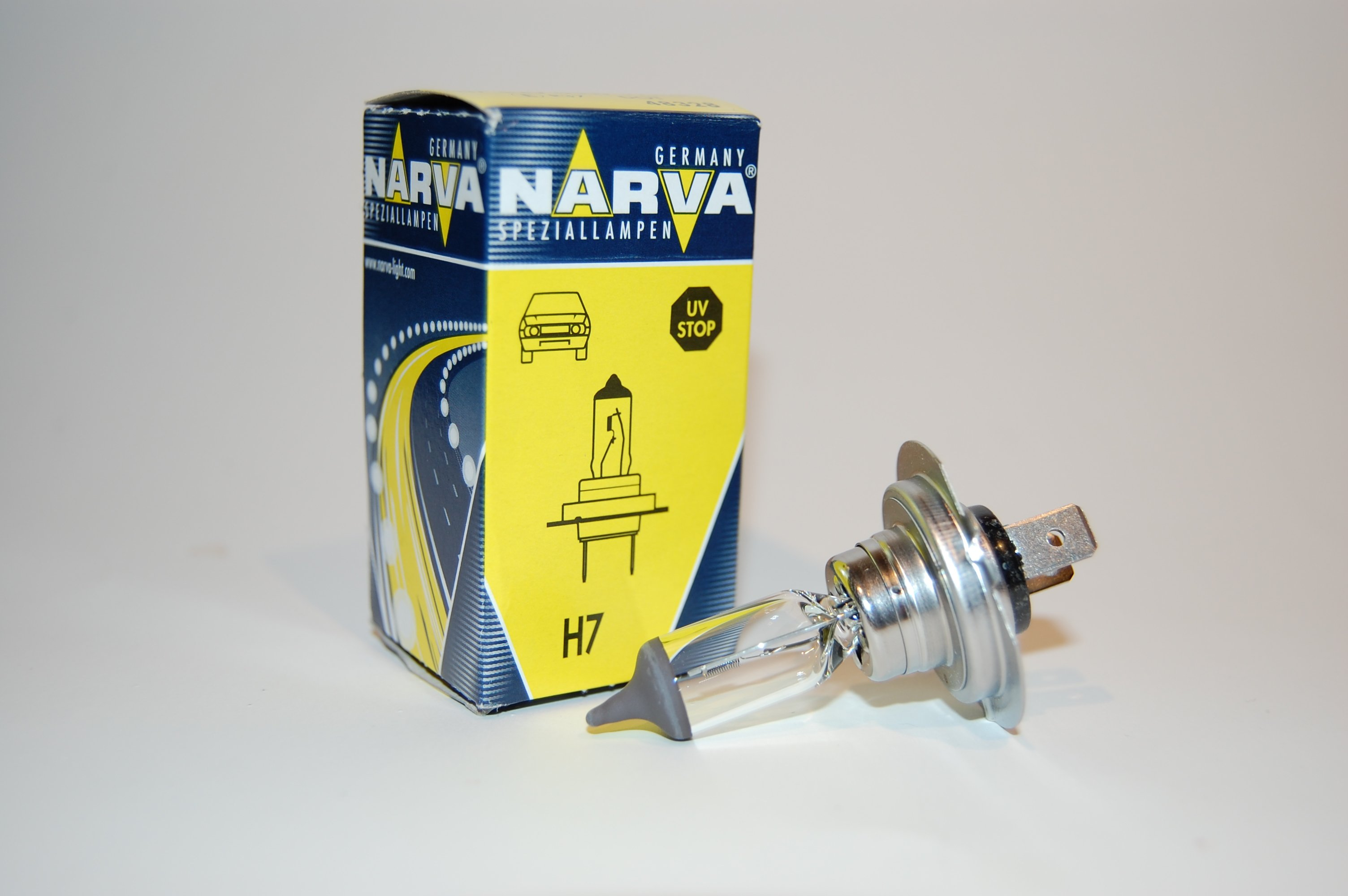 Halogenbirne H7 der Firma Narva